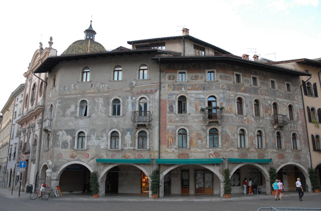 Trento, Piazza Duomo, frescoes. Picture taken by Giovanni Iachello.